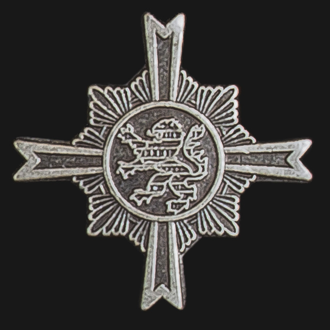 Anstecknadel zum Ehrenbrief des Landes Hessen. Höhe/Breite: 15 mm, Material 925er Silber (Sterlingsilber).